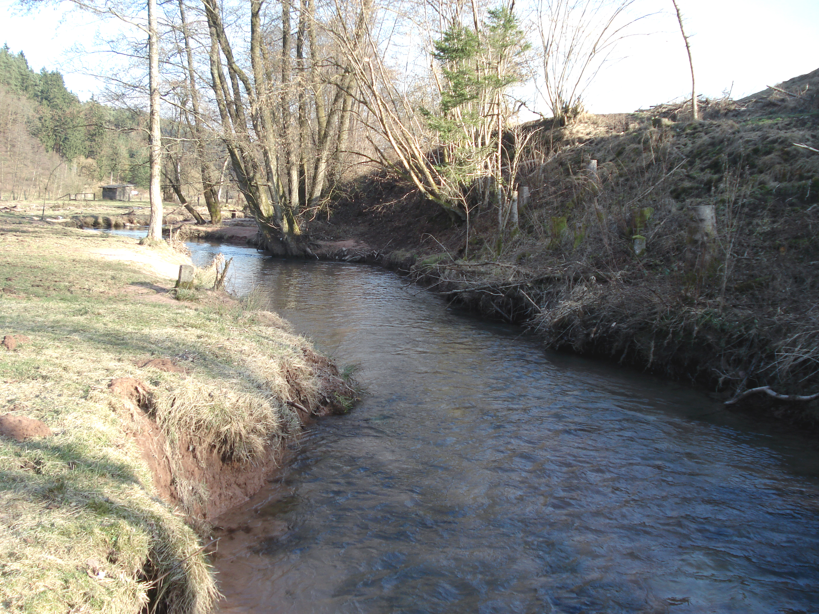 Die Aura nach Fellen